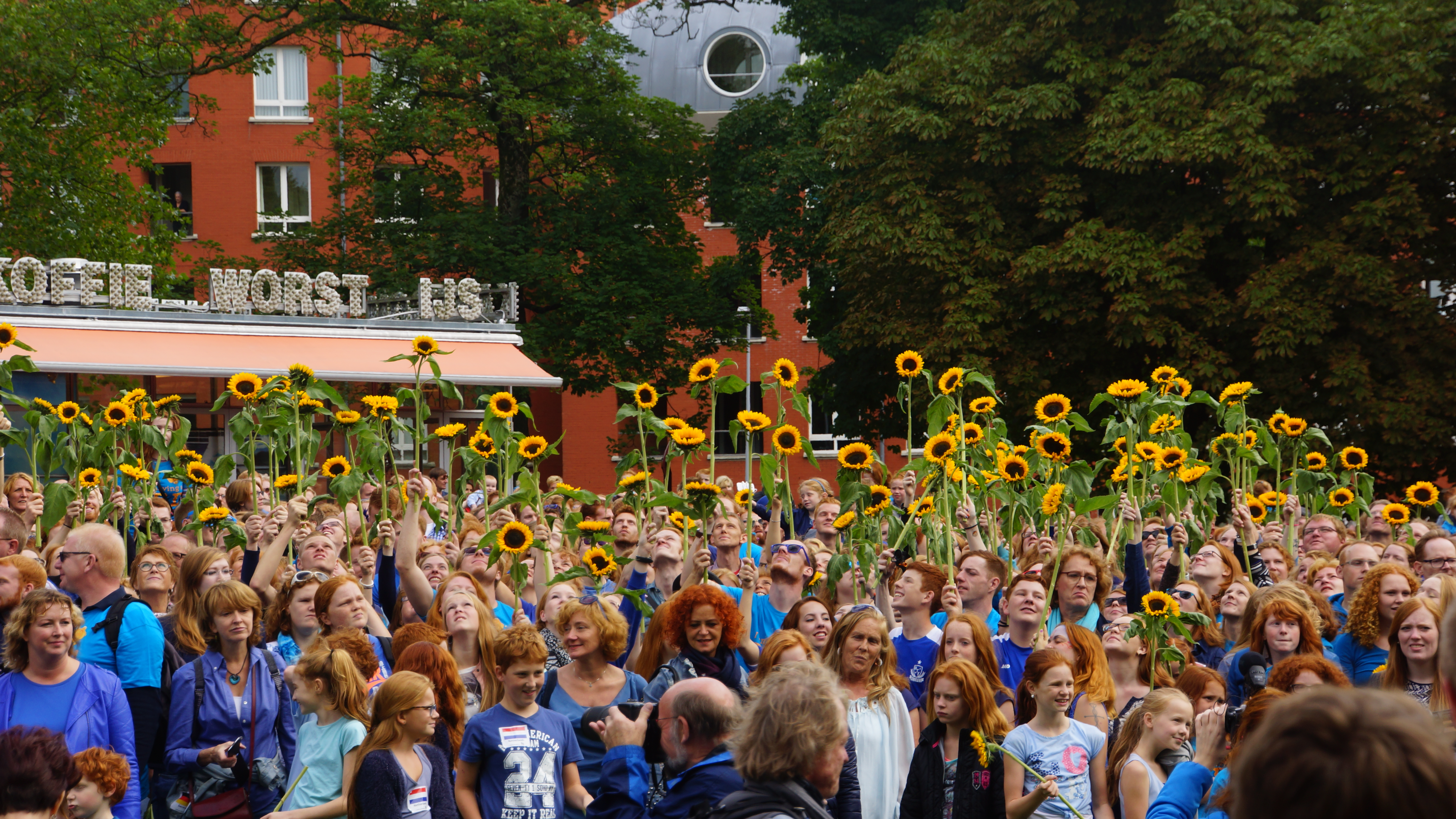 Gruppenfoto Redheaddays 2015